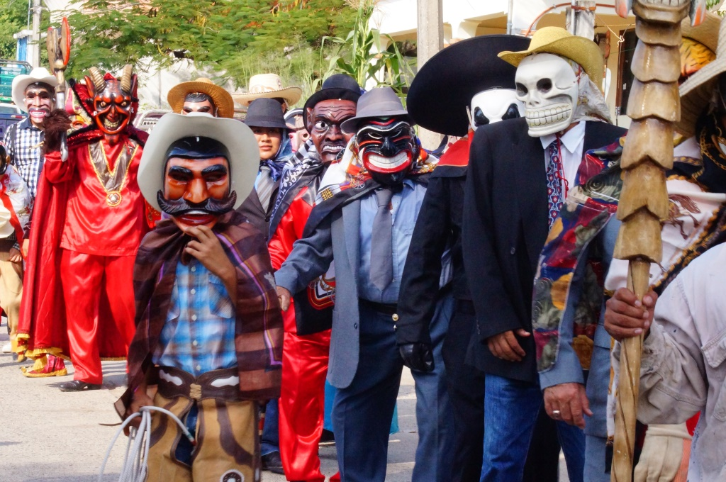 Personas con trajes tradicionales y màscaras de madera en el Festival "Xantolo" 2013 en el pueblo de Tempoal, Veracruz, Mèxico en la huasteca Veracruzana.